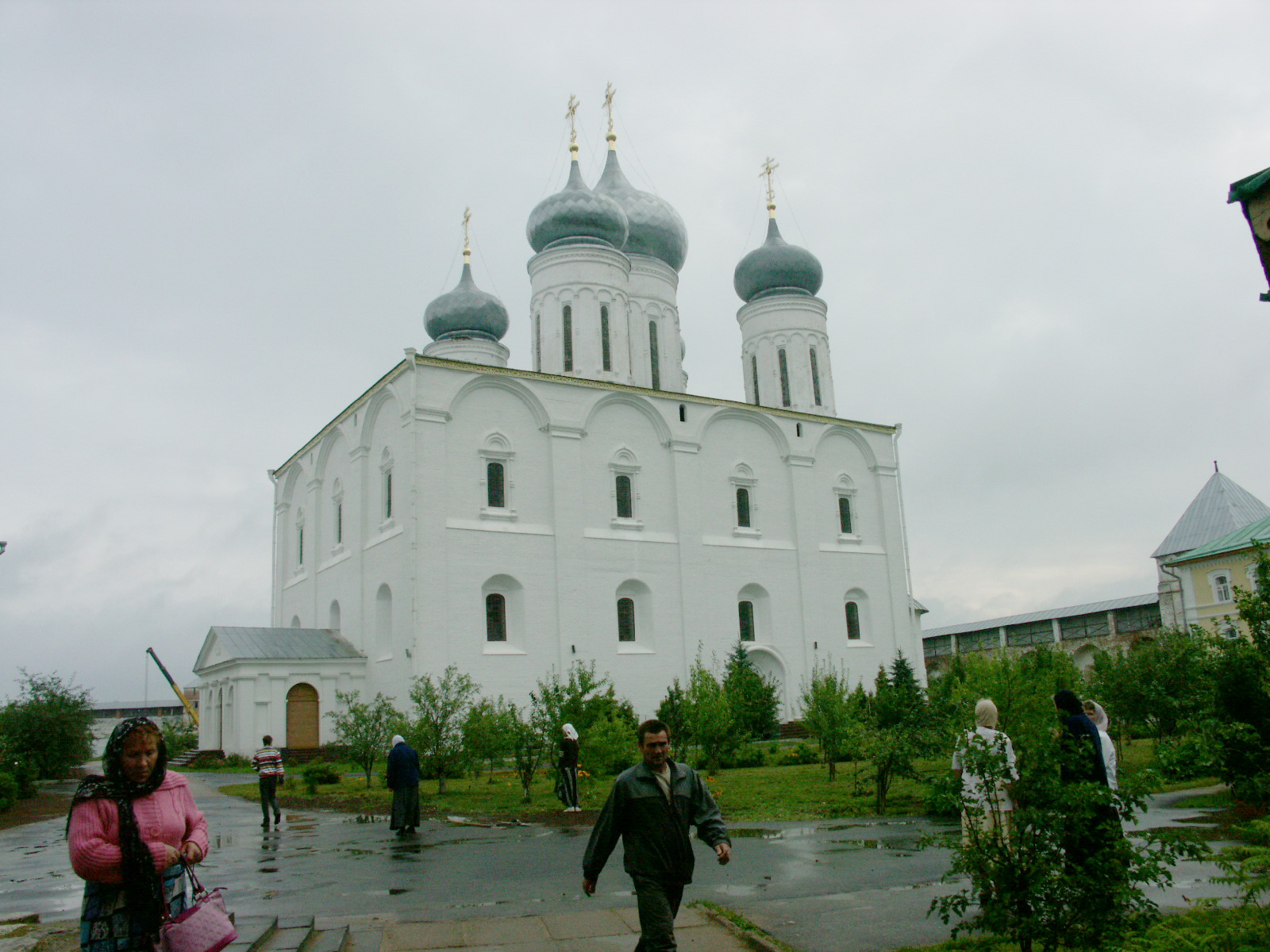 собор Троицкий с настенной живописью (Нижегородская область, Лысково, рп Макарьево)